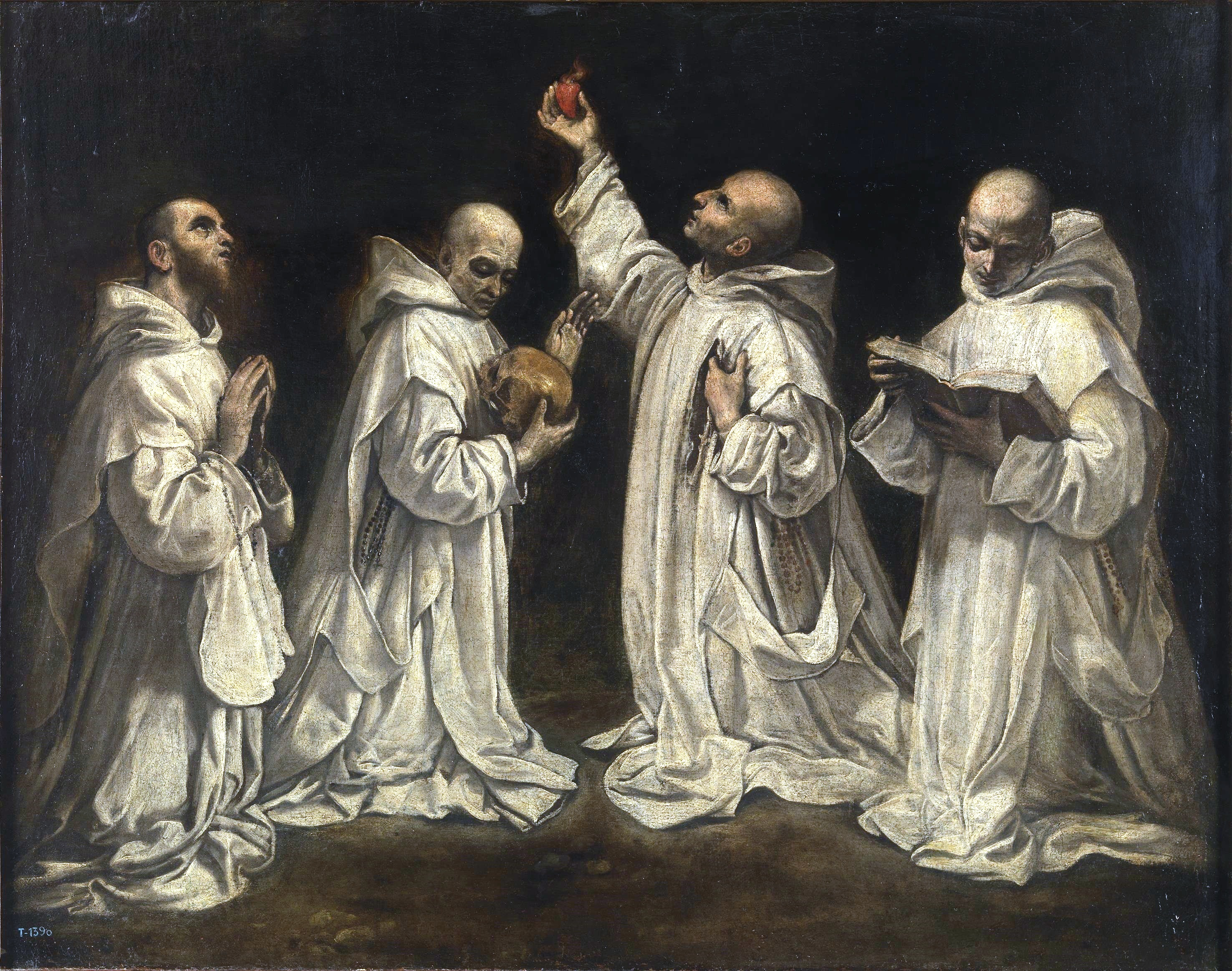 La obra representa a San Bruno de Colonia, el fundador de la Orden de los Cartujos, teniendo una visión mientras se halla acompañado por unos monjes de su Orden.